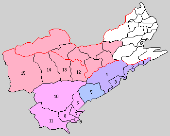 徳島県海部郡の町村制時点の町村。